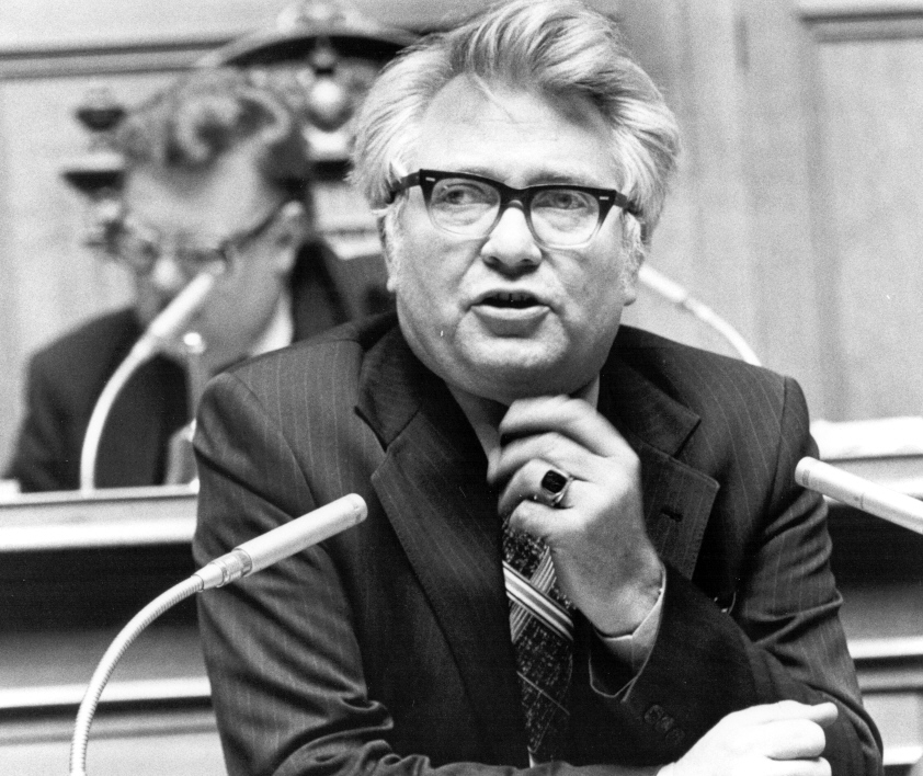 Heinrich Ott, Schweizer Politiker, am Rednerpult im Nationalratssaal